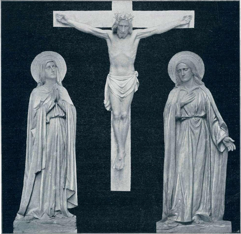 Kalvarija, Steinhof pri Dunaju.